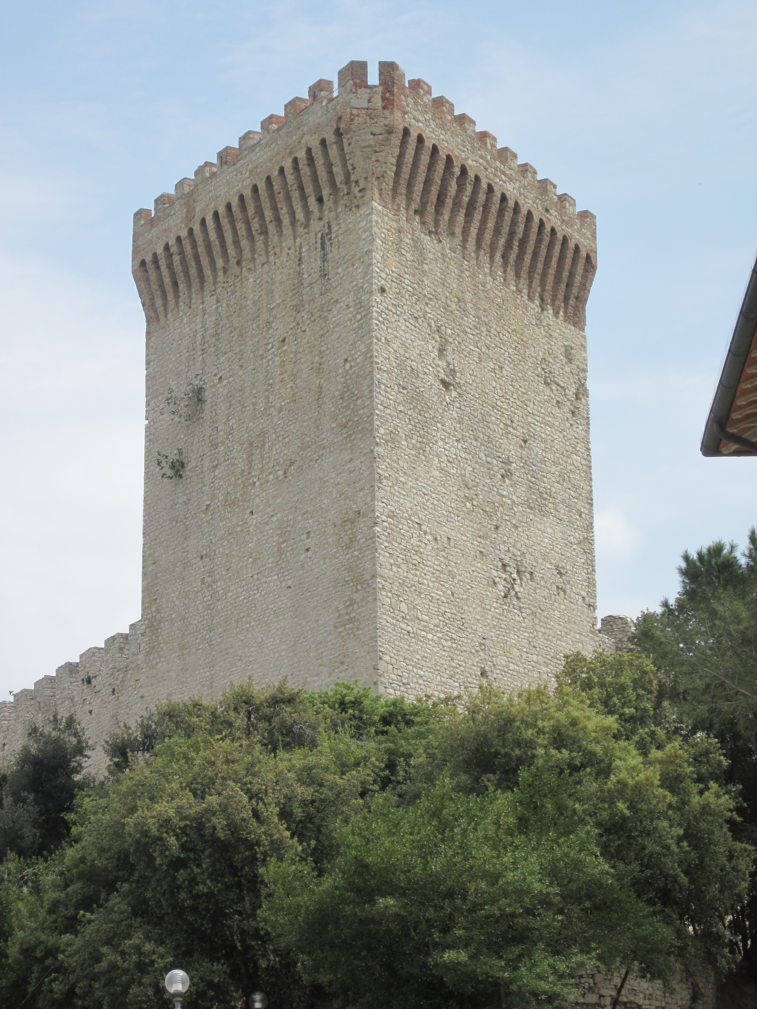 Castiglione del Lago: Turm der Festung